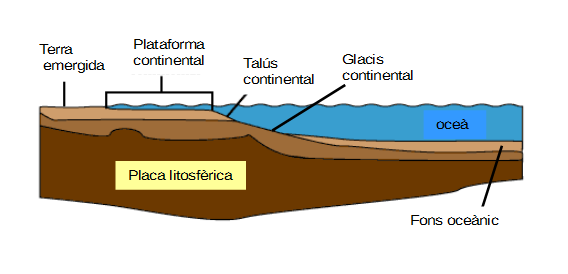 Parts de la placa continental segons la seva immersió en la massa oceànica.